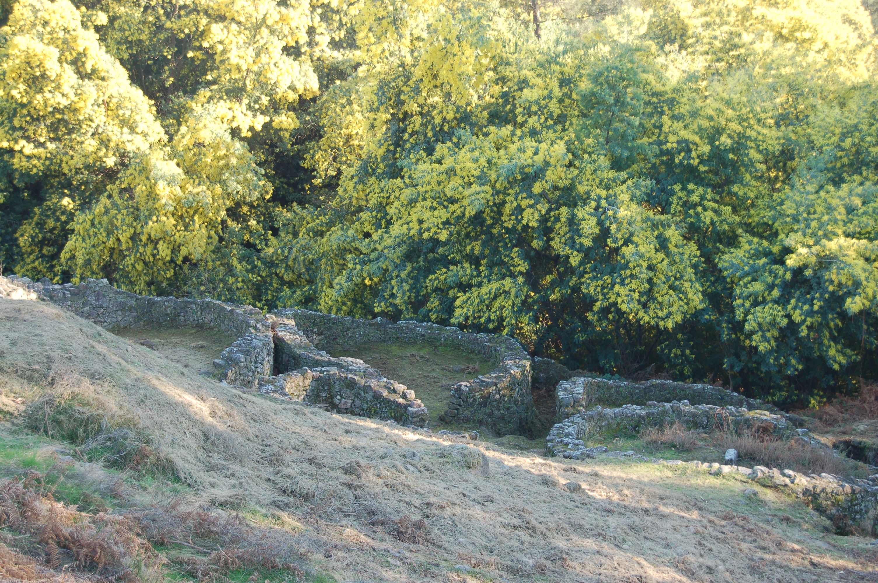 Castro de Troña